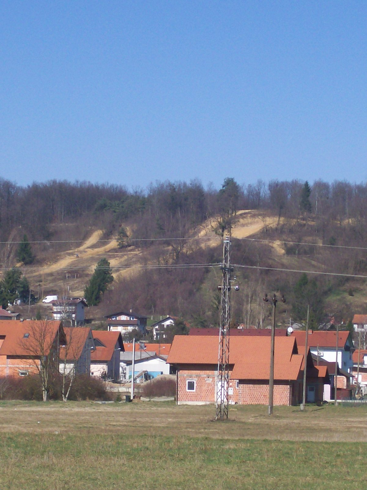 Motocross staza Savski Marof